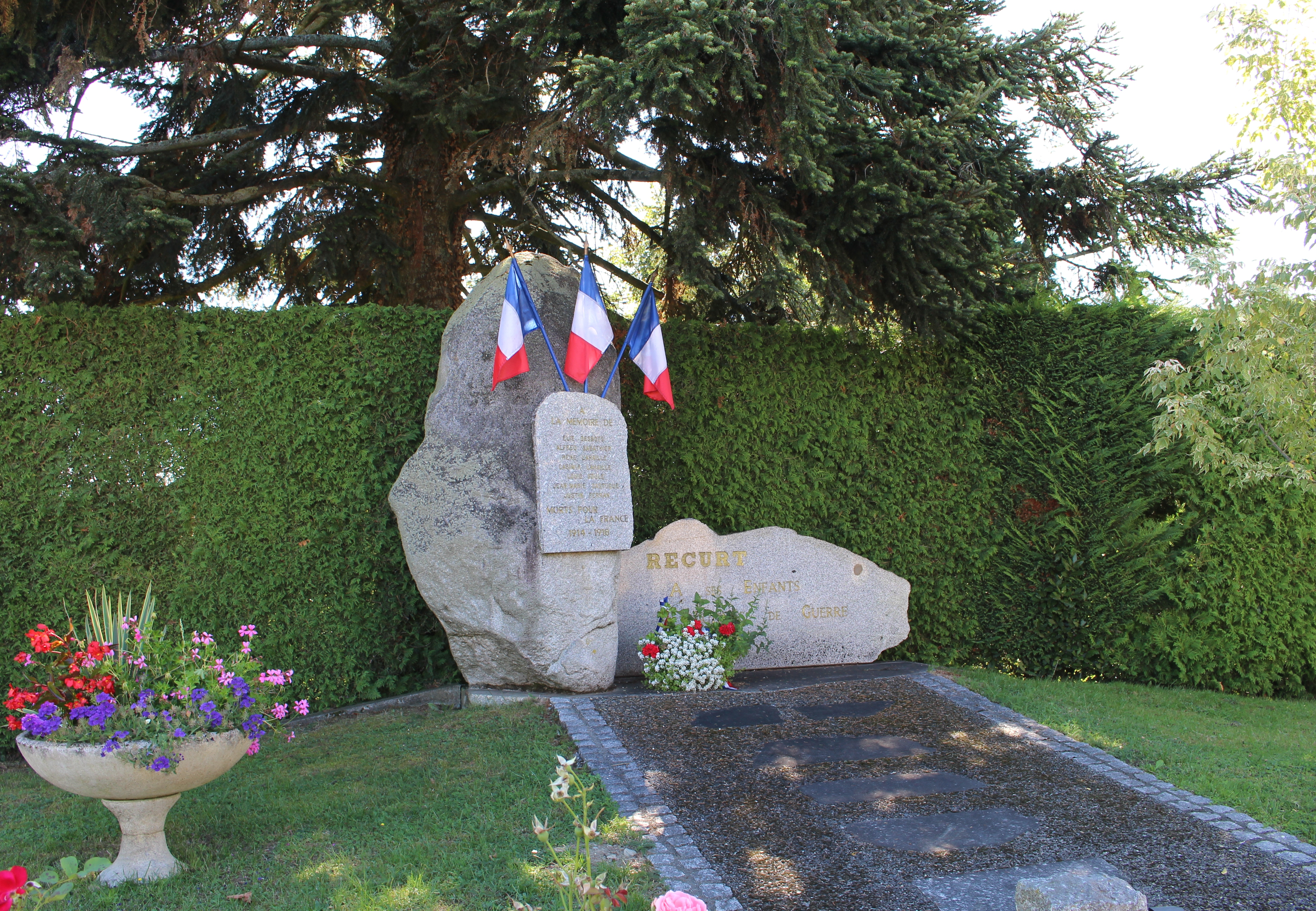 Monument aux morts de Recurt (Hautes-Pyrénées)